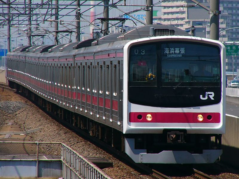 舞浜駅に入線する国鉄205系電車 撮影者・投稿者：Chabata k 撮影日：2004年4月10日 撮影場所：千葉県浦安市 京葉線舞浜駅